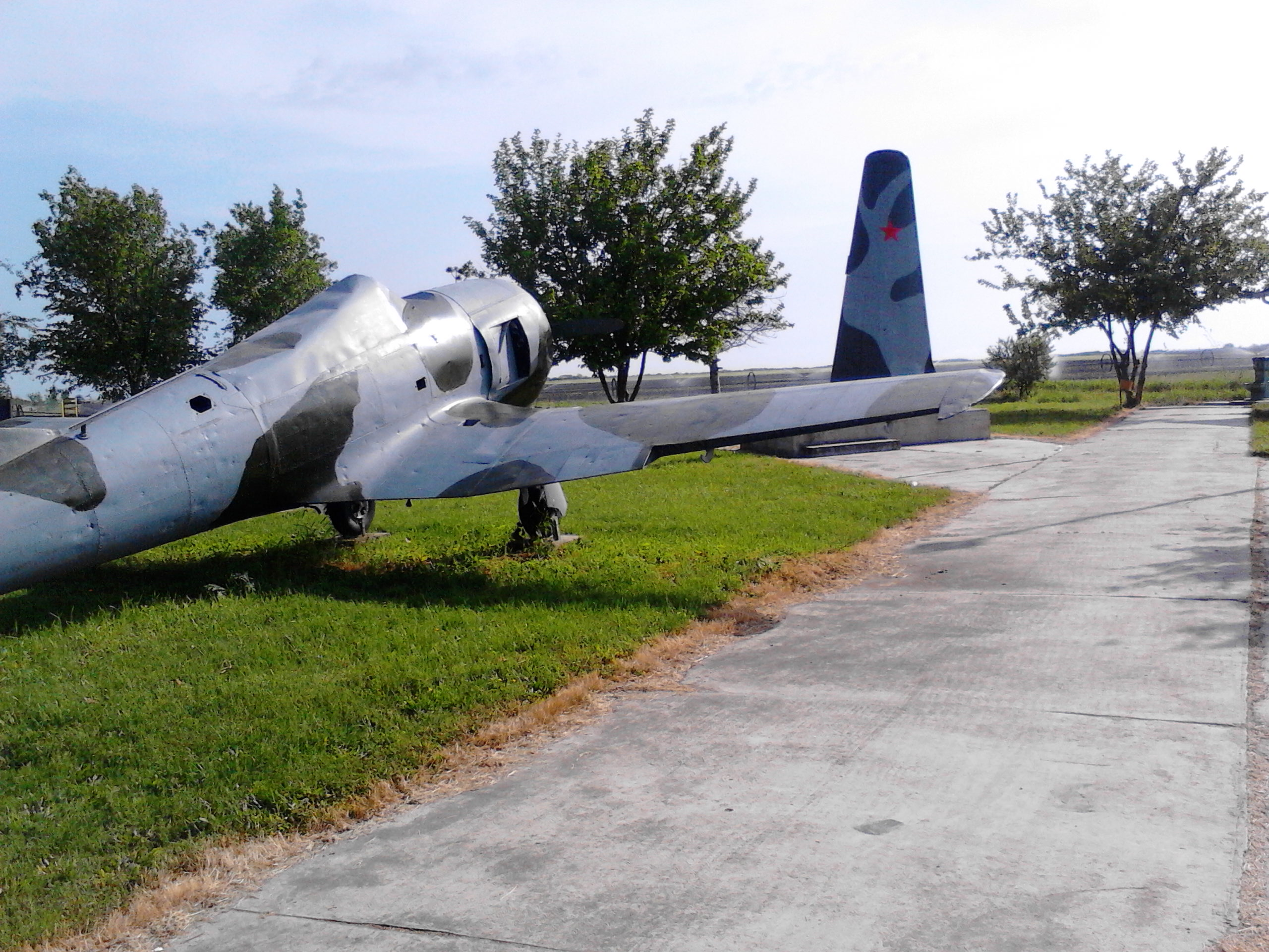 Srpski (latinica): Soko 522 pretvoren u spomenik 423. puku u ataru sela Gospođinci